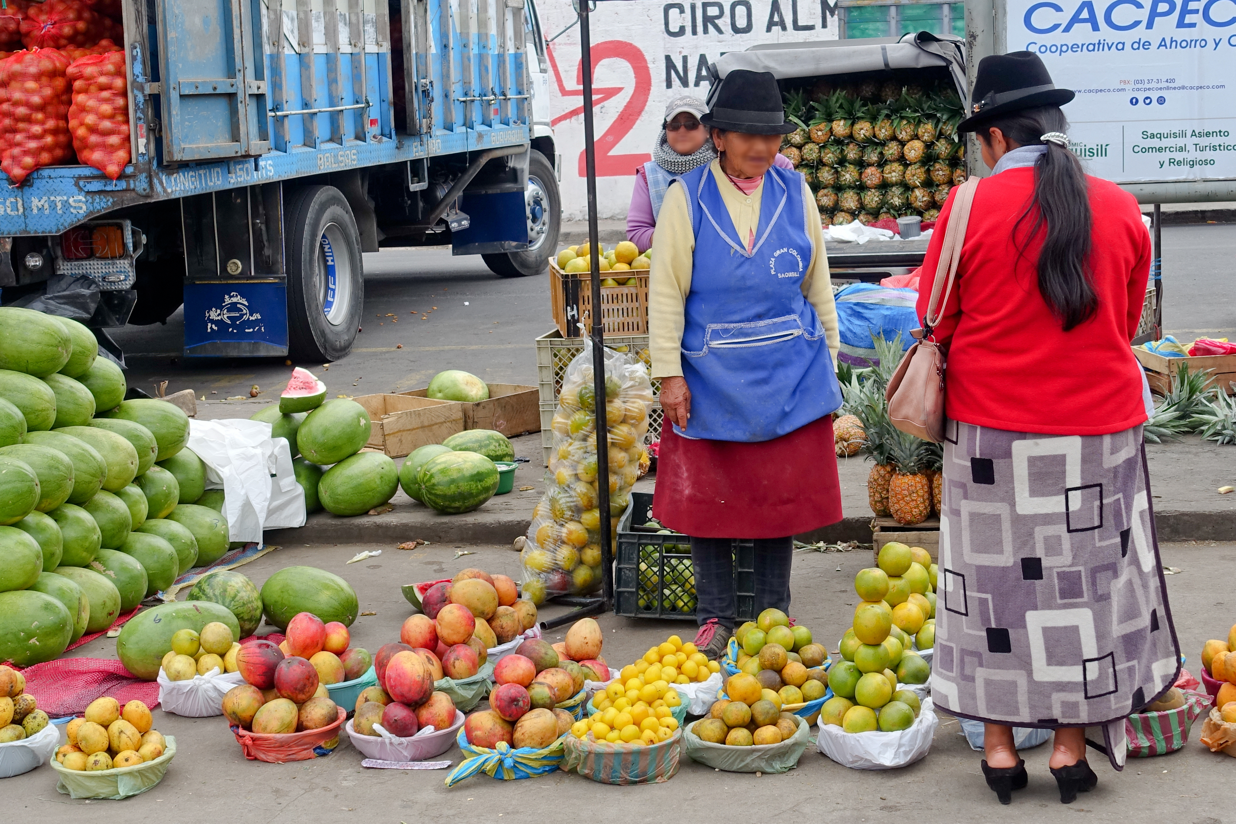 Indigener Markt in Saquisilí, Cotopaxi, Ecuador